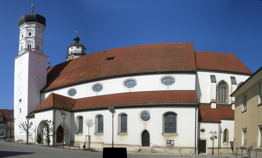 Evangelische Stadtkirche in Giengen an der Brenz, Baden-Württemberg; stark verzerrte Weitwinkel-Aufnahme